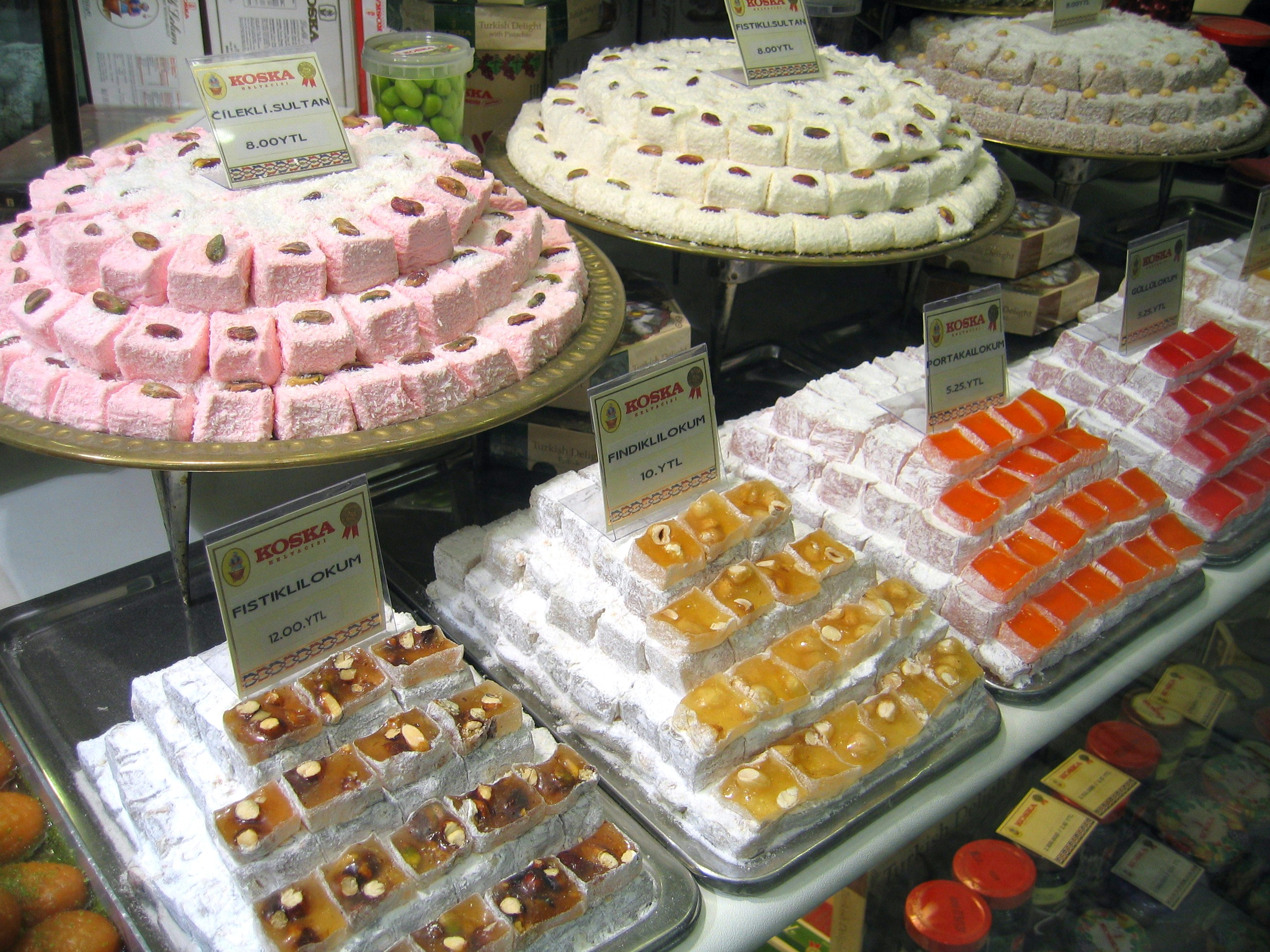 Turkish delight on display at Koska Helvacısı